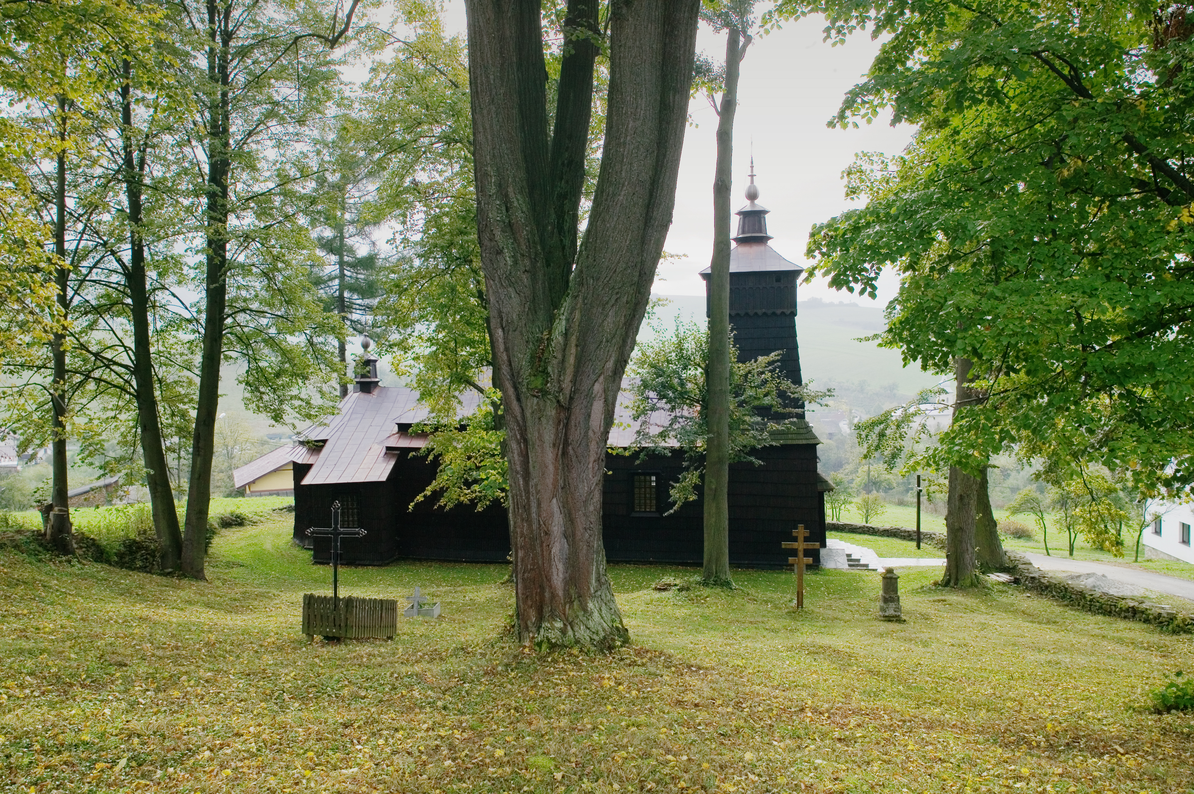 Leluchów, cerkiew greckokatolicka pw. św. Dymitra (obecnie kościół rzymskokatolicki)